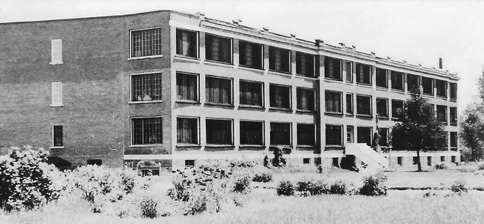 Vue de la facade sud, côté rivière Batiscan, et des solaria. Le sanatorium servait à soigner les malades atteints de la tuberculose.